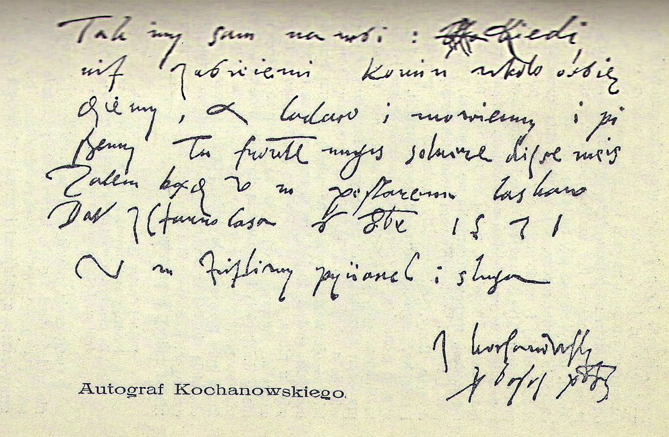 Pismo/autograf Jana Kochanowskiego z 1571 roku